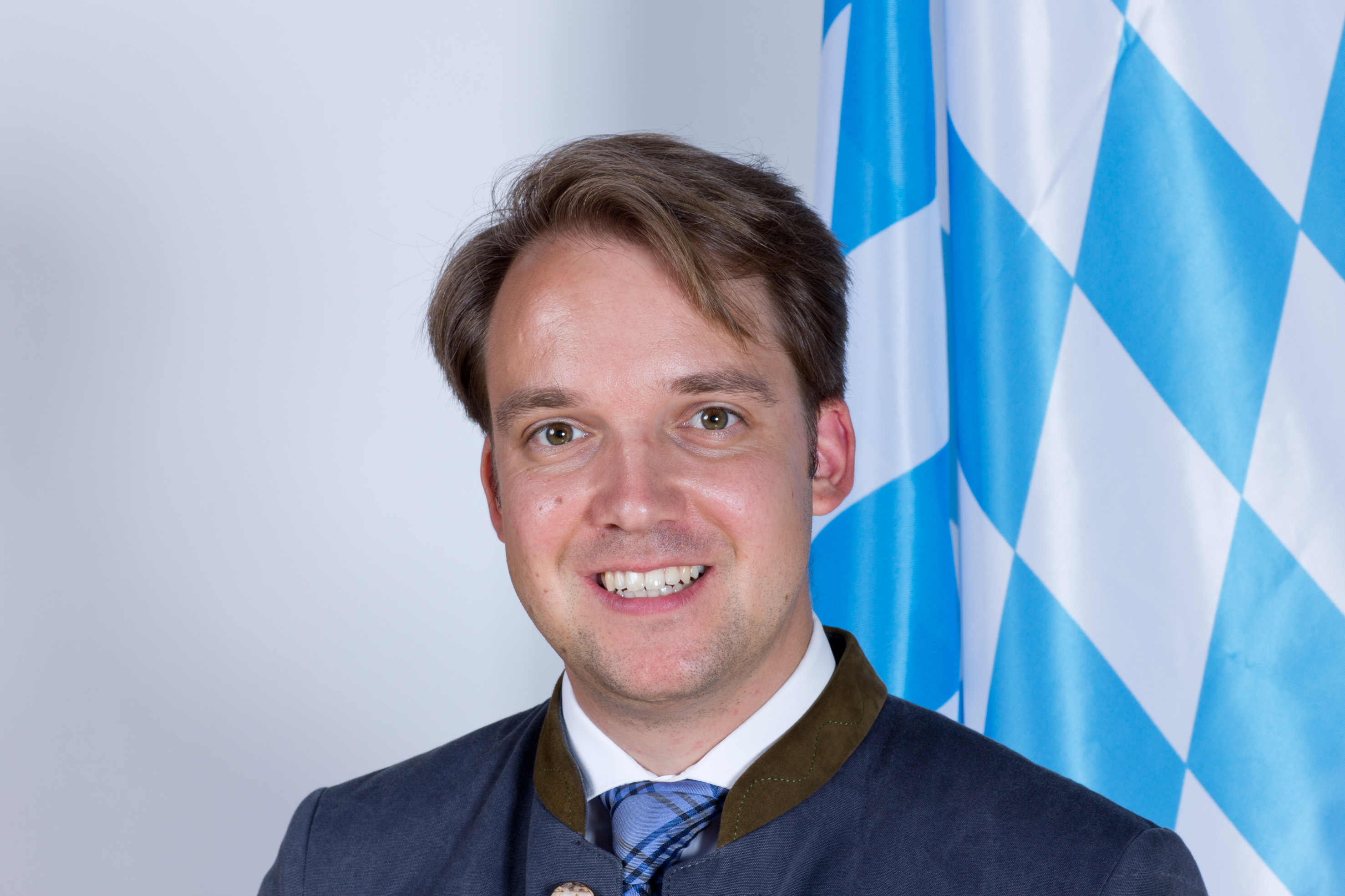 Wikipedia im Landtag – Bayern 17. bis 19. Juli 2012 in München Dieses Foto wurde im Rahmen des Projektes „Wikipedia im Landtag“ erstellt.